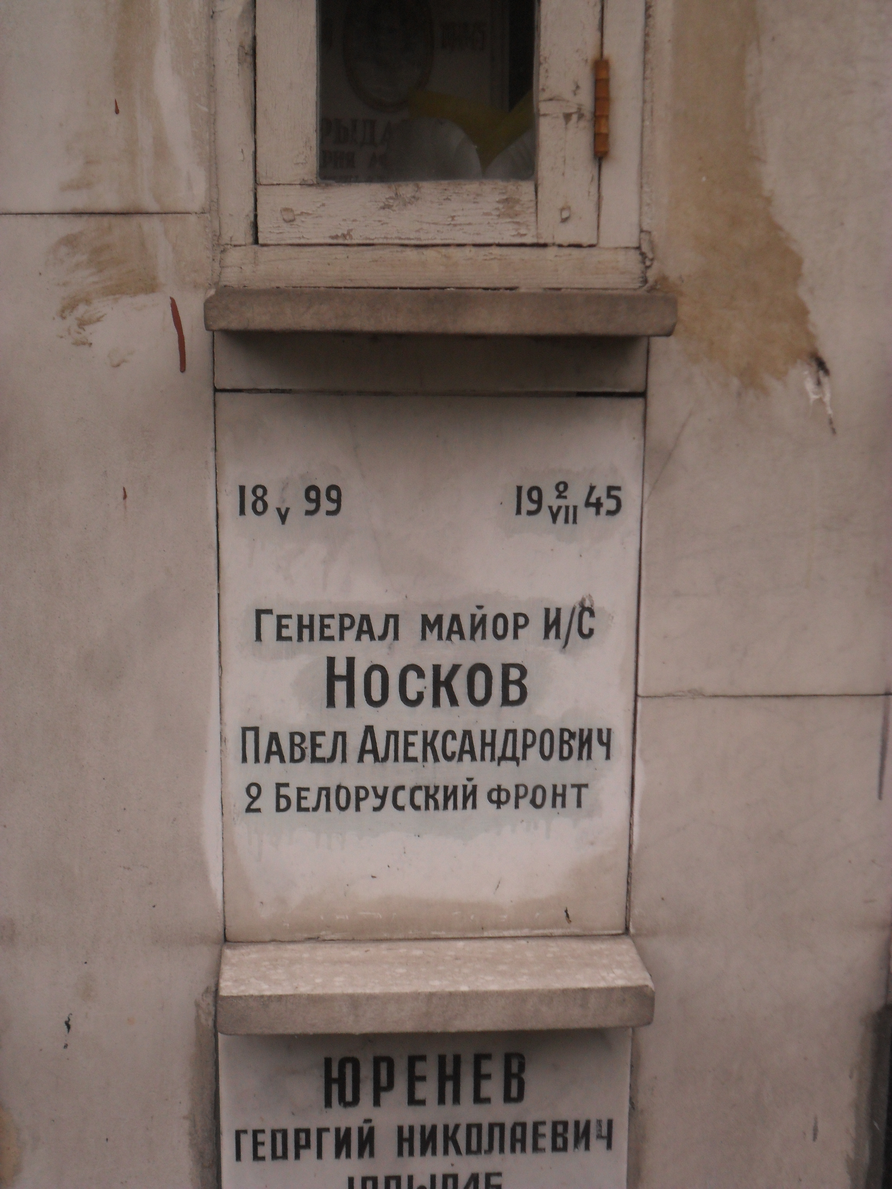 Плита колумбария генерал-майора Павла Носкова на Новодевичьем кладбище Москвы.